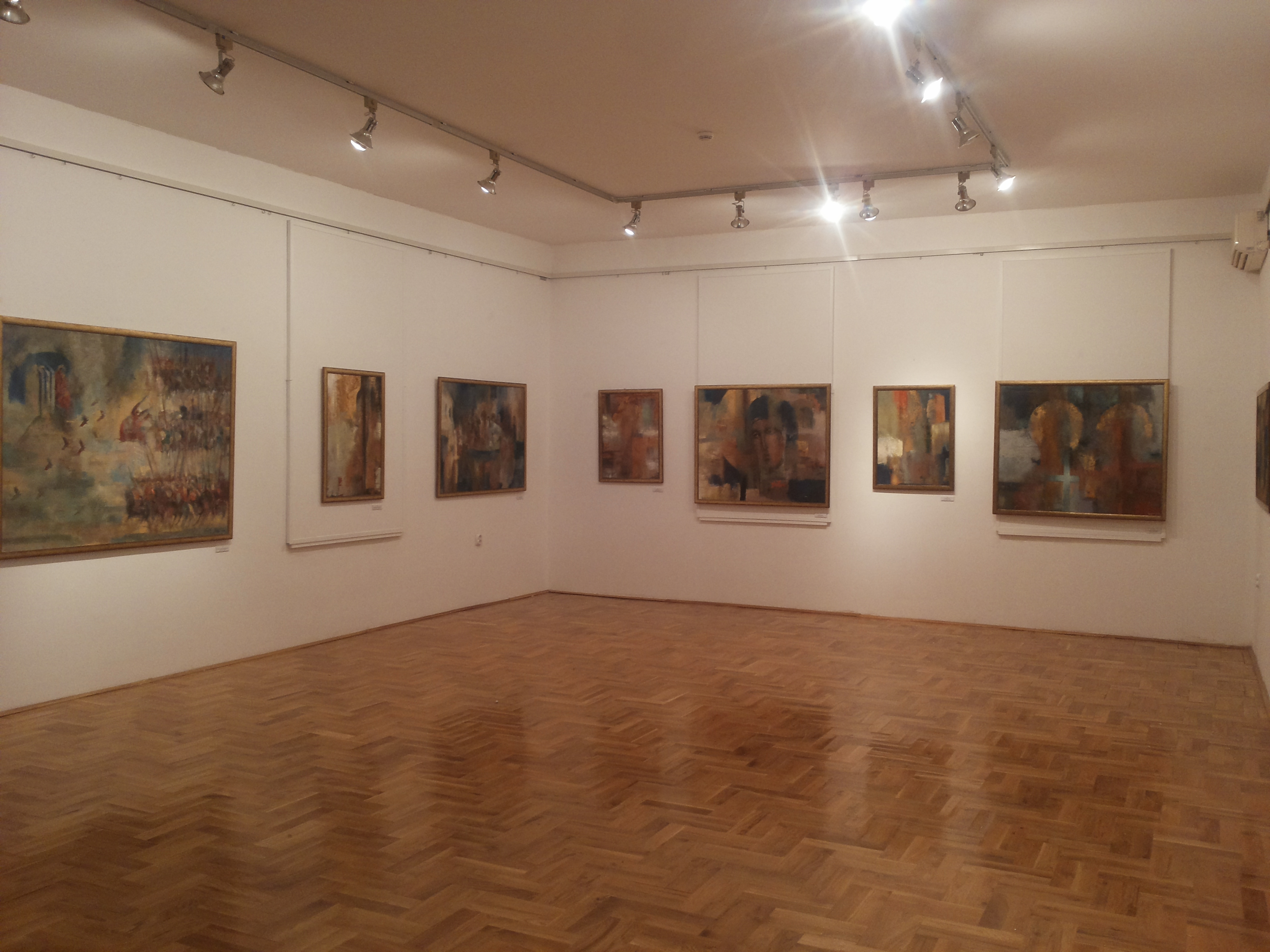 Изложба Зоран Чалија